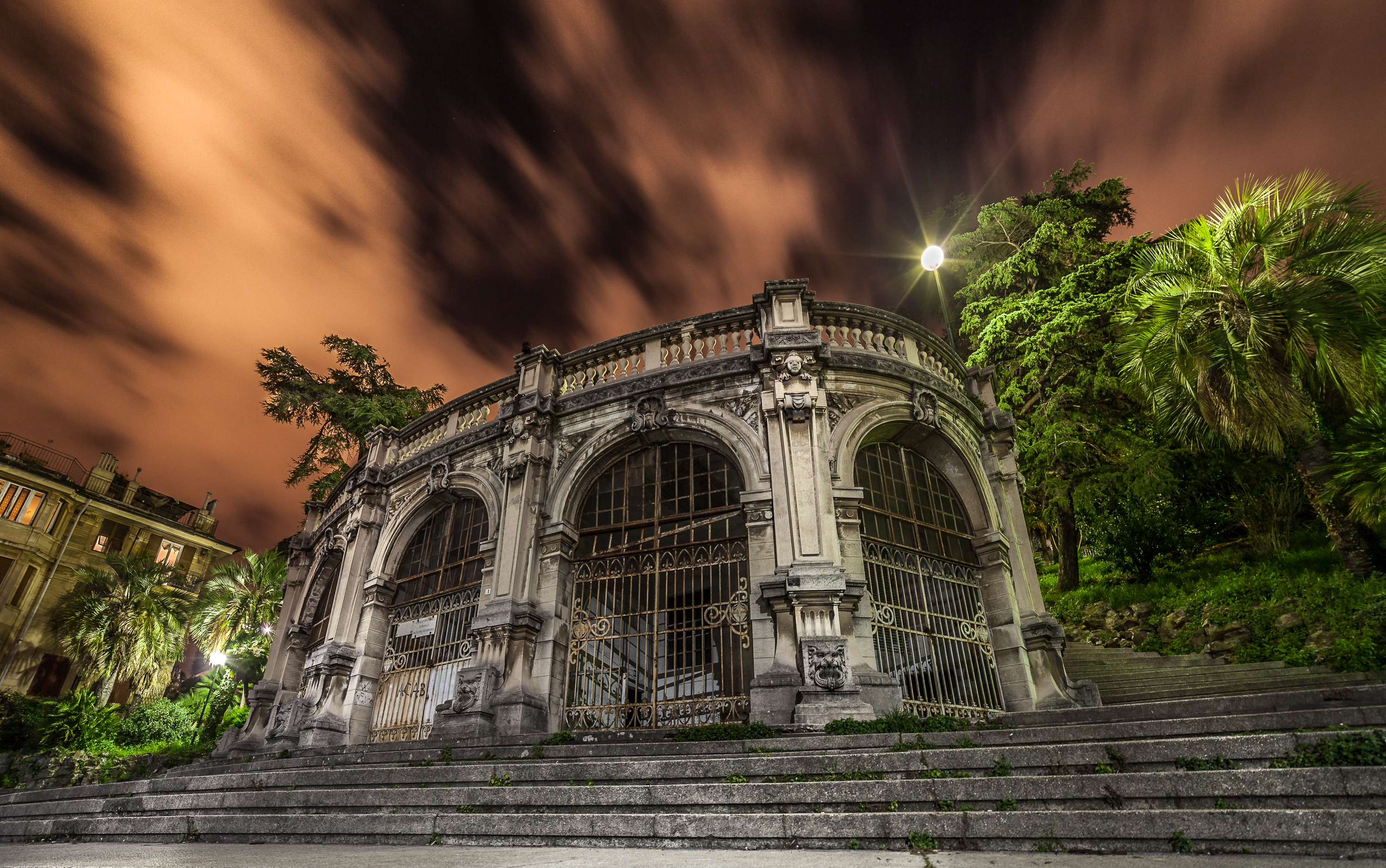 scalinata Giorgio Borghese in una serata nuvolosa e tempestosa. Grazie alla lunga esposizione a all'obiettivo super grandangolare è possibile vedere il correre delle nuvole sopra il monumento illuminate dalle luci della città. This is a photo of a monument which is part of cultural heritage of Italy.